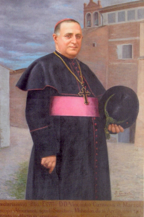 Retrato del eclesiástico español Vicente Casanova y Marzol (1854-1930), que llegó a ser cardenal de la Iglesia Católica y también obispo de Almeria y arzobispo de Granada.